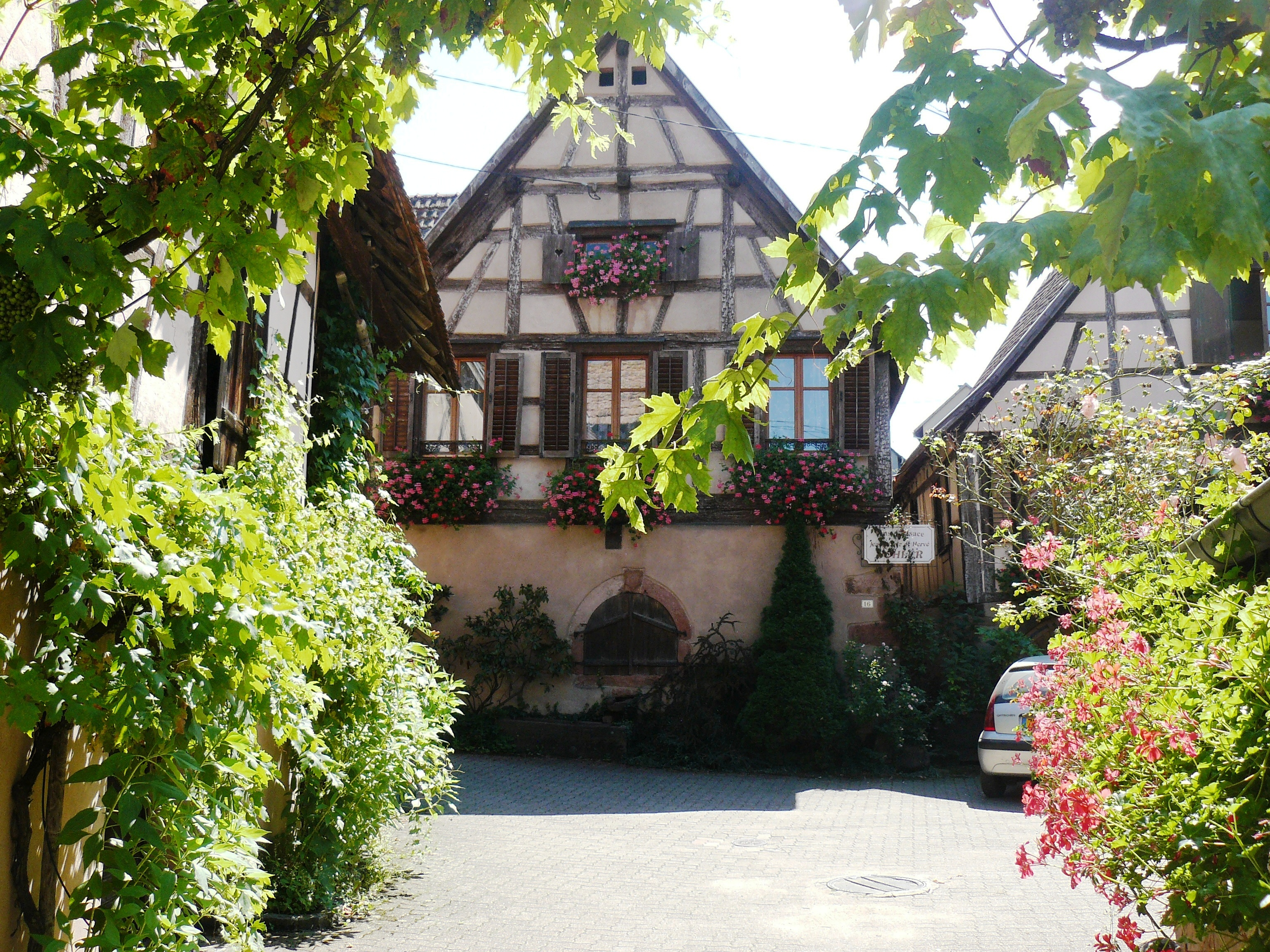 Maison à colombages magnifiquement fleurie, aujourd'hui cave vinicole